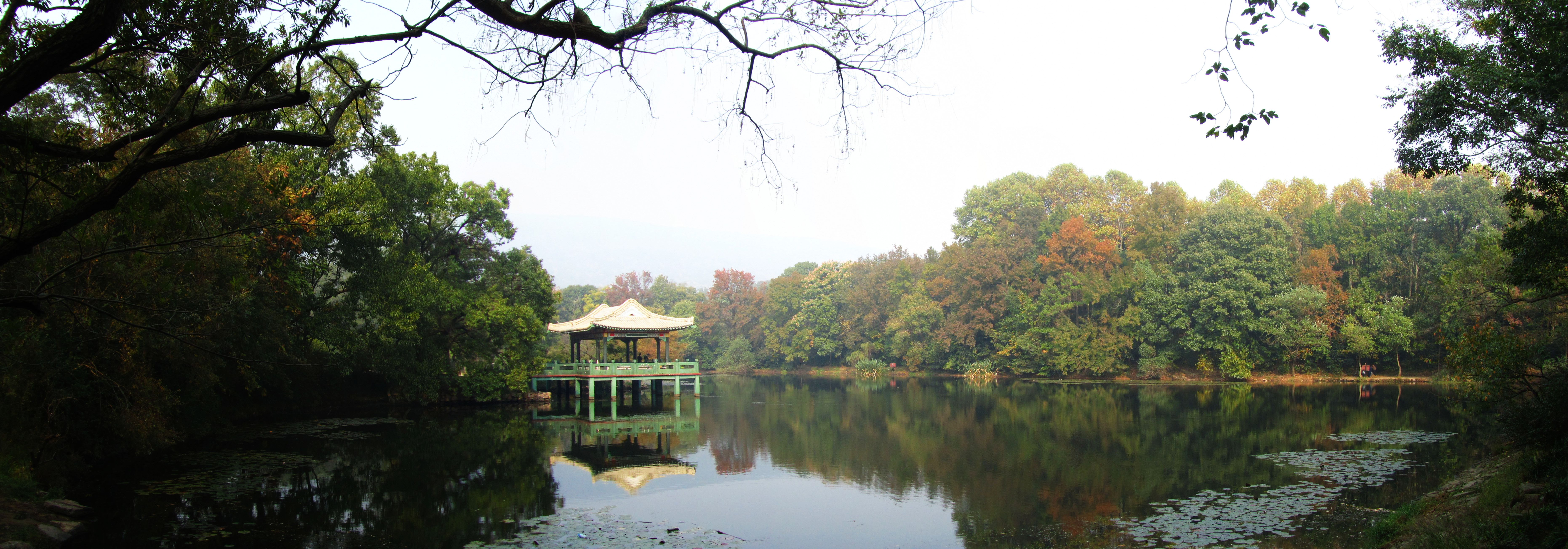 紫金山流徽榭全景。